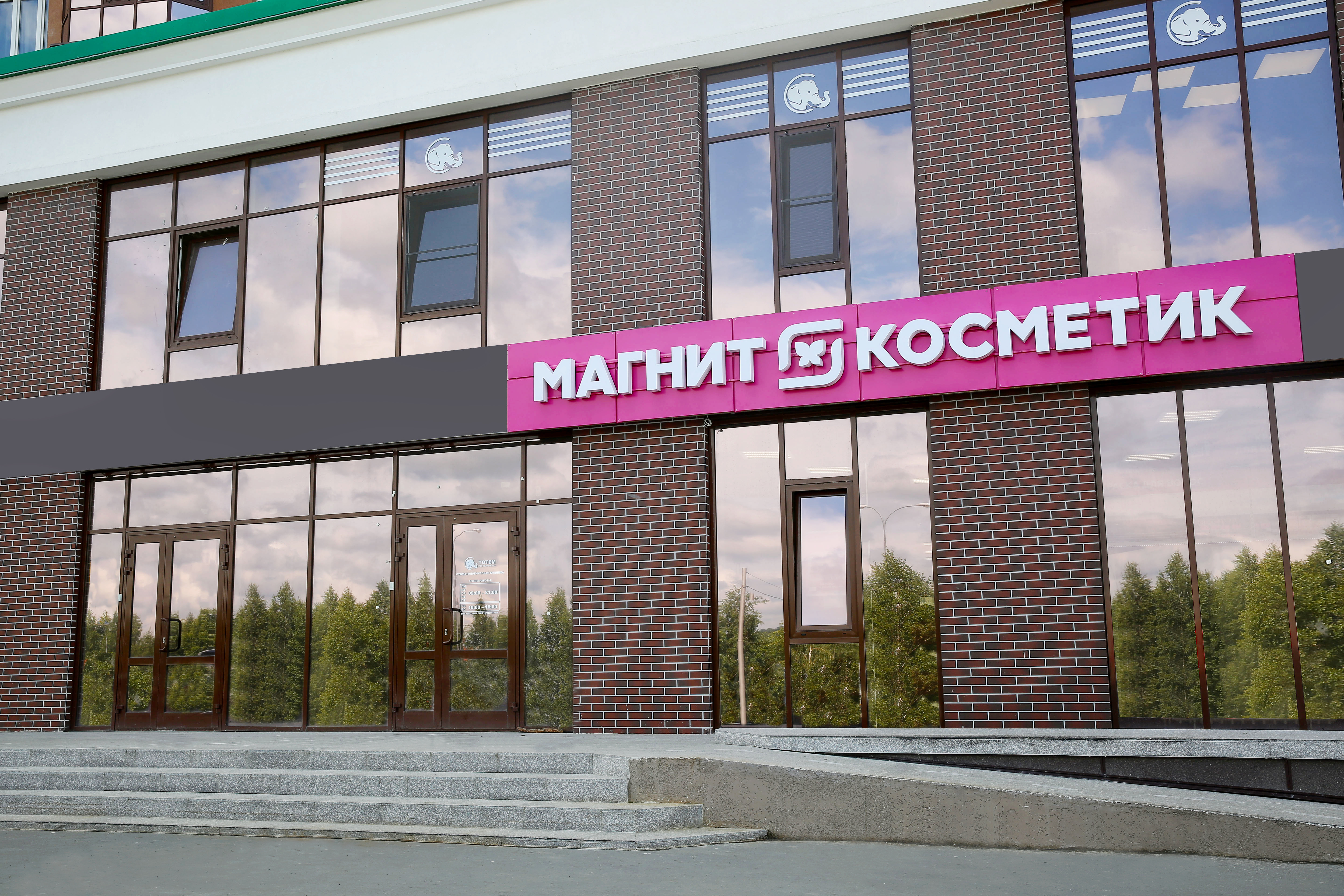 Московская Область